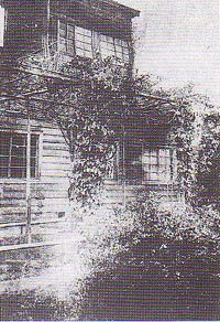 新井奥邃の「謙和舎」